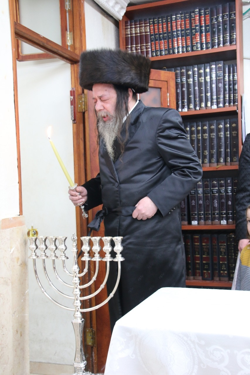 האדמו"ר מקהילת זוויהל רבי גדליה משה גולדמן בהדלקת נר ראשון של חנוכה